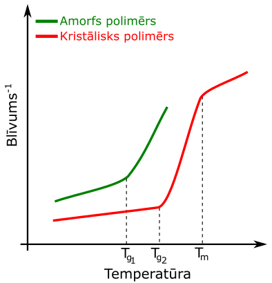 Raksturīgās temperatūras kristāliskos un amorfos polimēros.